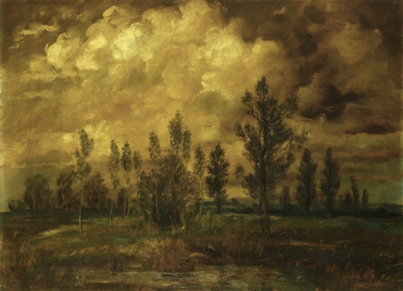 Viktor Rolín (1887 - 1942) - Dramatická krajina